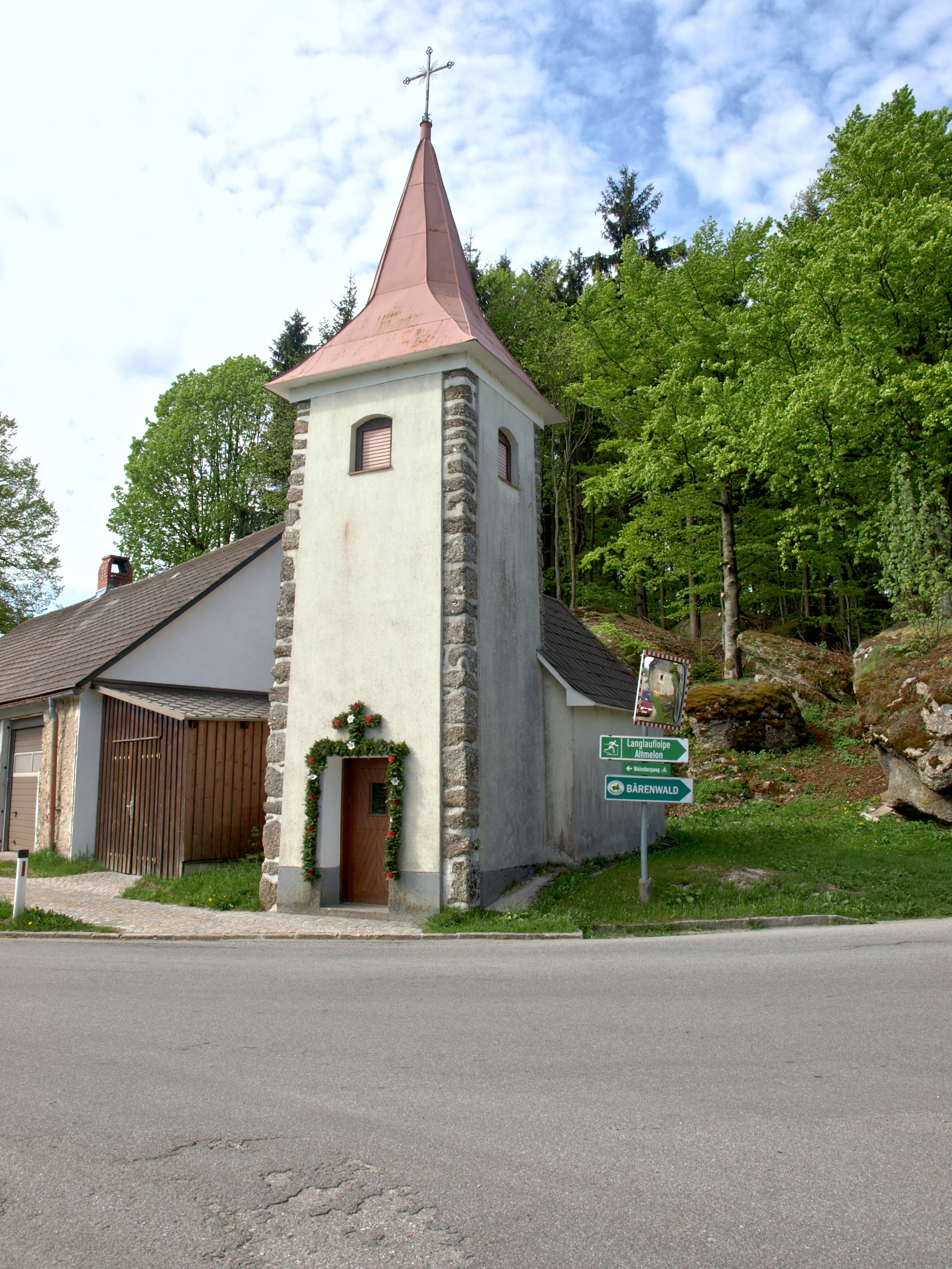 Ortskapelle Kleinpertenschlag